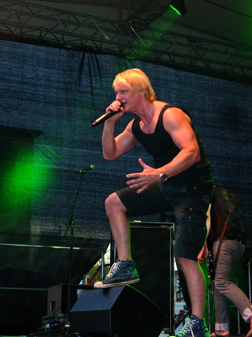 Stefan Krähe, der Frontmann der deutschen Rockband Six bei einem Auftritt 2013.